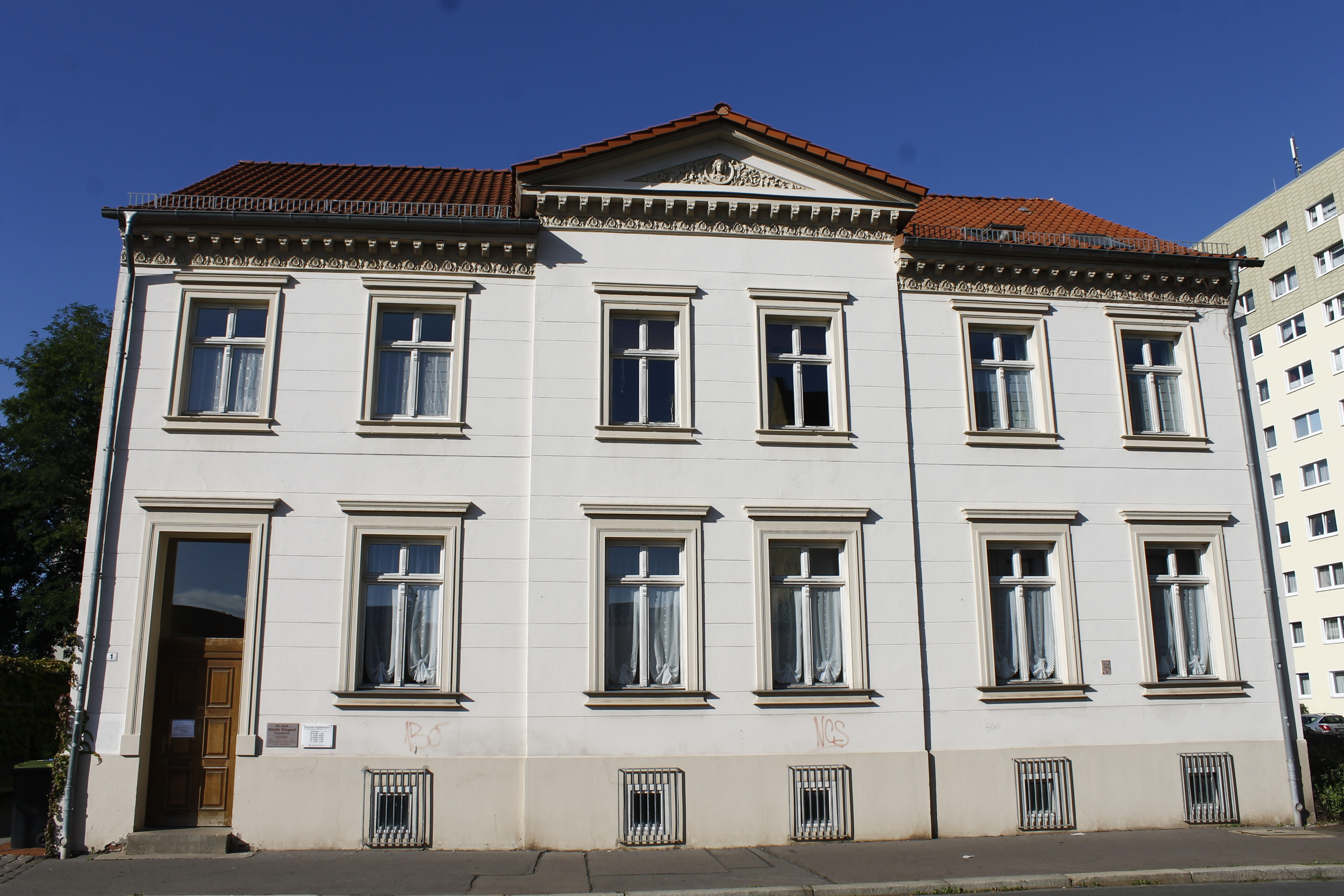 Historisches Wohnhaus in der Ritterstraße 1, Alte Neustadt in Magdeburg